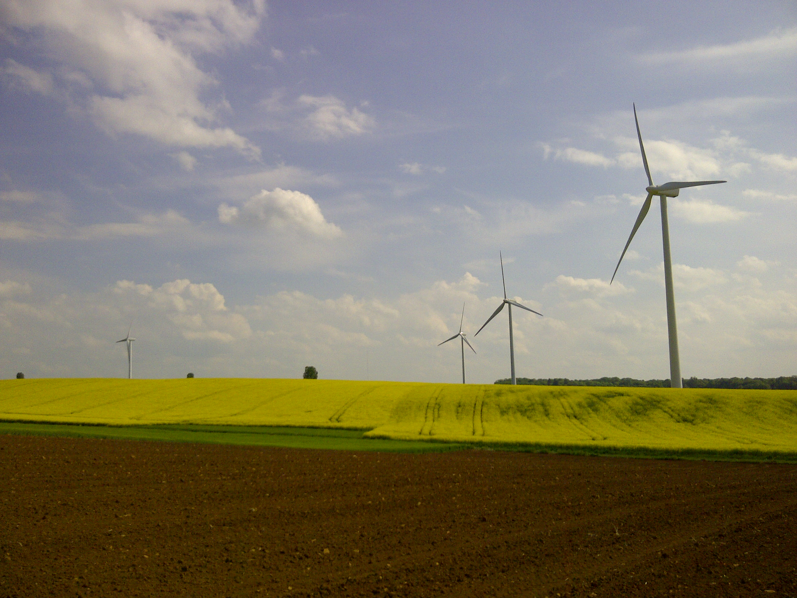 Le groupe des éoliennes du village d'Is-en-Bassigny